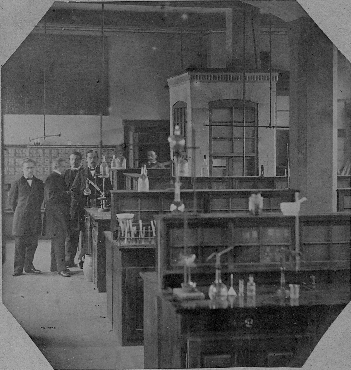 Assistent Karl Birnbaum im Labor von Karl Weltzien (* 8. Februar 1813 in Sankt Petersburg; † 14. November 1870 in Karlsruhe)